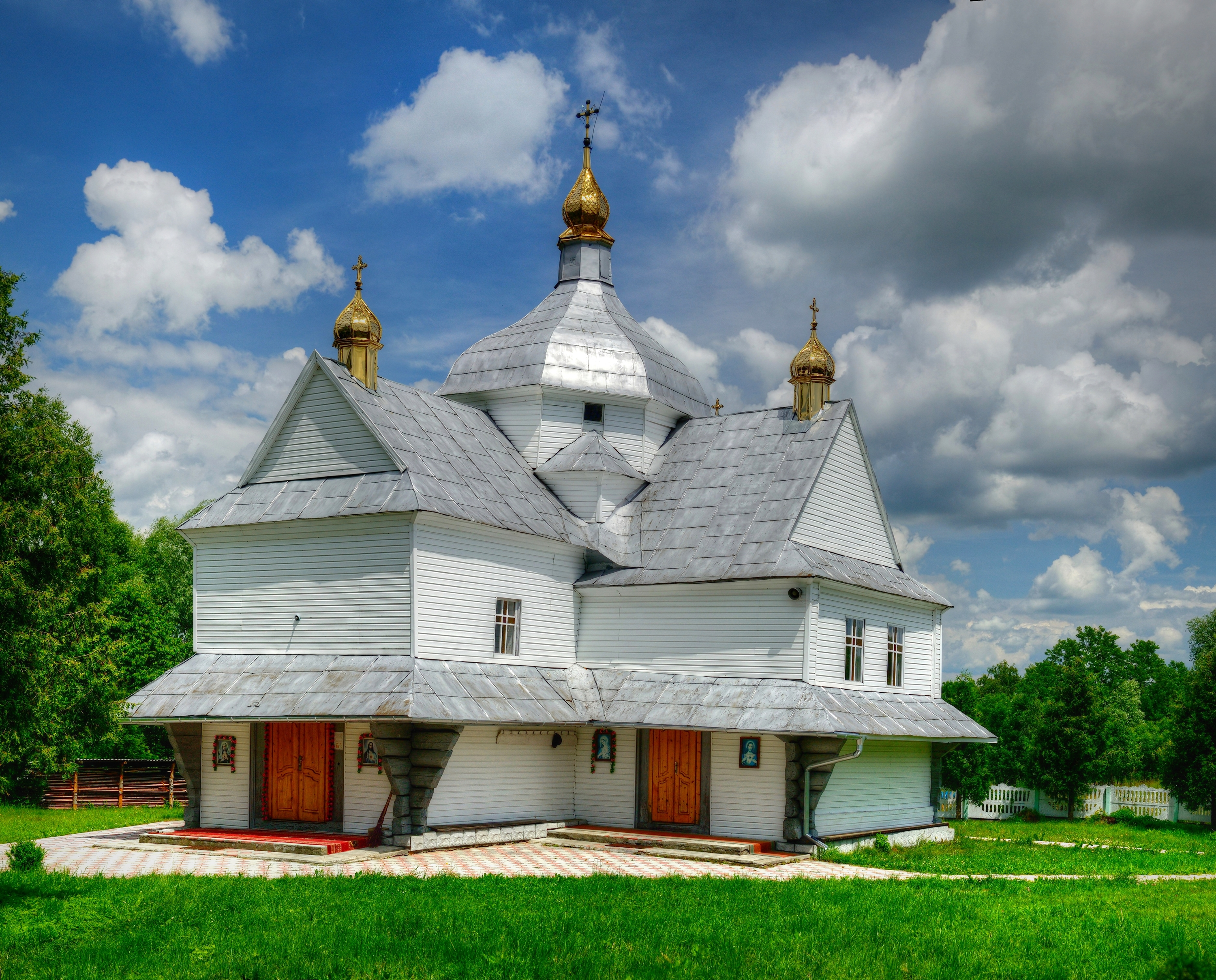 Церква Різдва Христового 1834р.